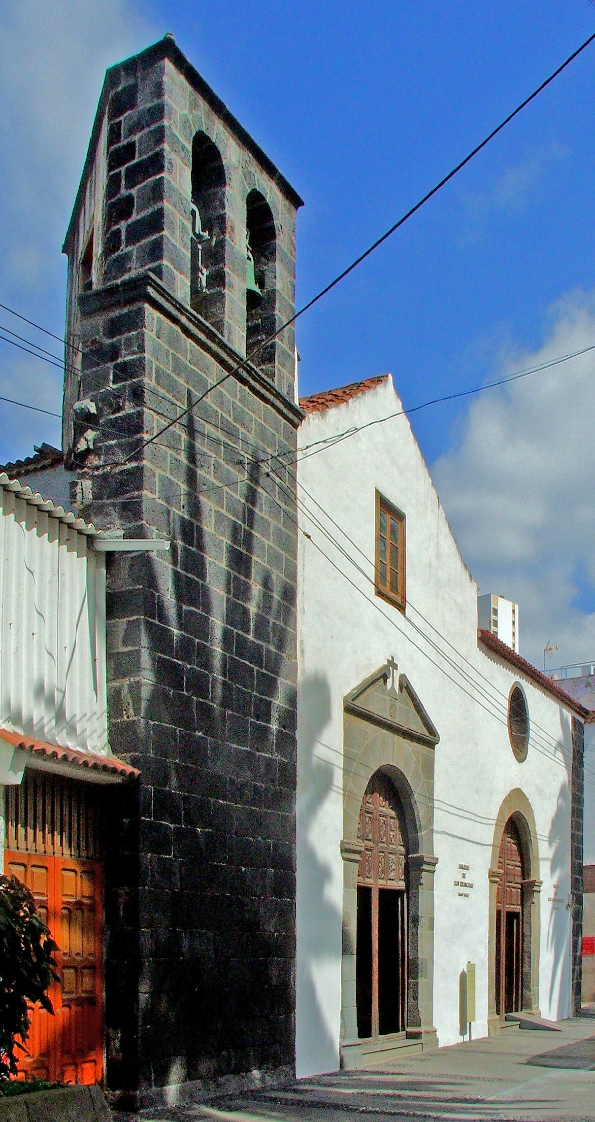 Fassade der Kirche San Francisco in Puerto de la Cruz